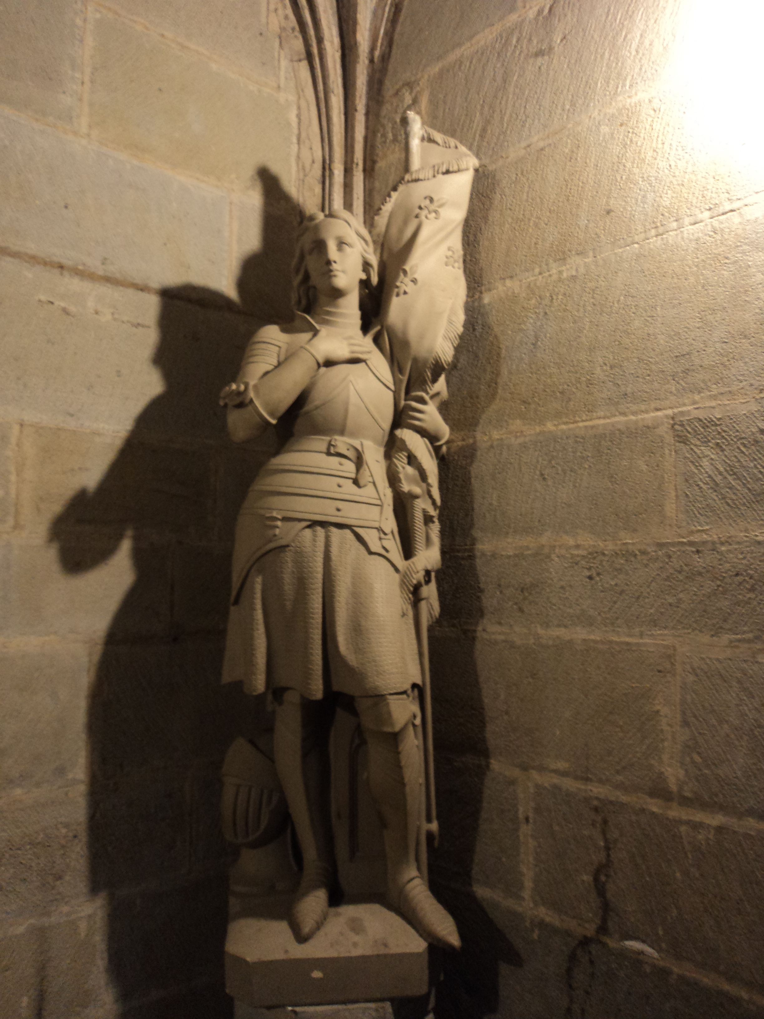 Estatua de Juana de Arco al Interior de la Basílica